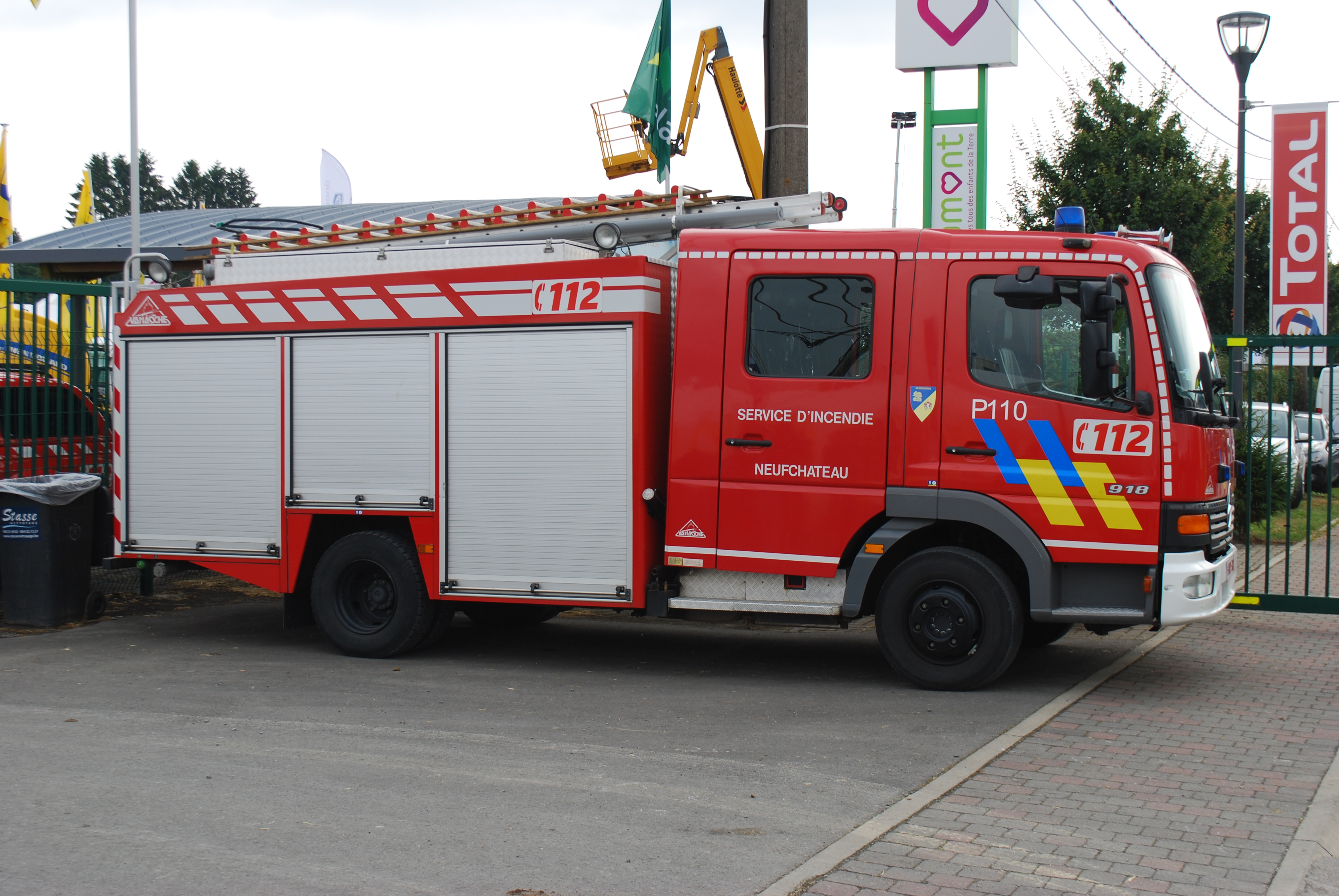 Vue de la Foire agricole de Libramont, dans le Luxembourg belge (82e édition en 2016).